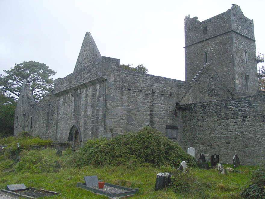 Abadía de Muckross Muckross Abbey, Killarney National Park. Photograph taken by David Edgar in November 2005.